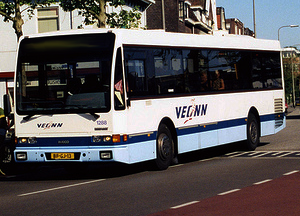 Veonn bus 1288 van het type Iveco Eurorider 391.E.12.29A / Berkhof ST2000NL in Zwolle, 1999.